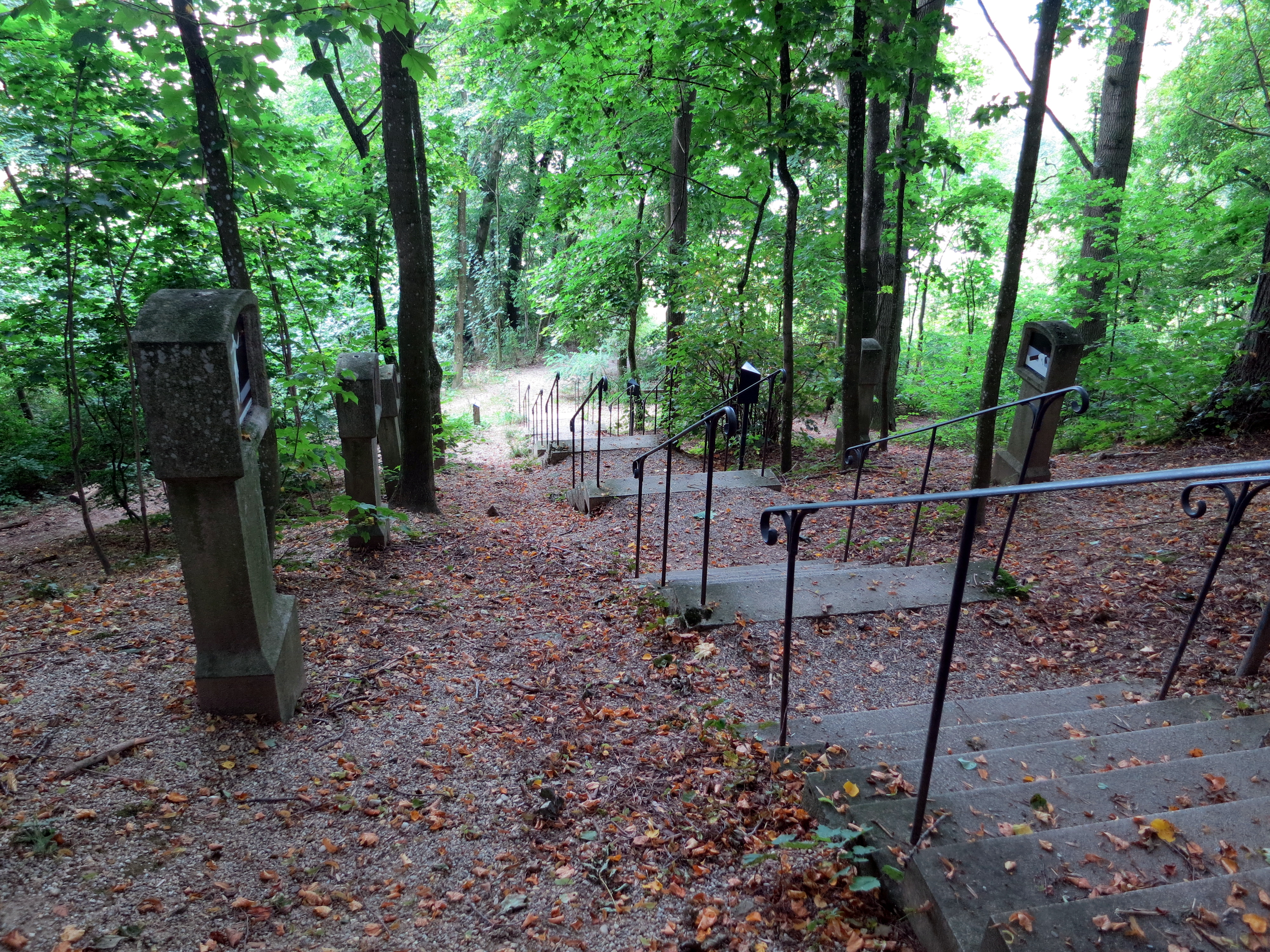 Kalvarienberg, östlich von Altomünster. Treppe mit Kreuzwegstationen zur Kapelle